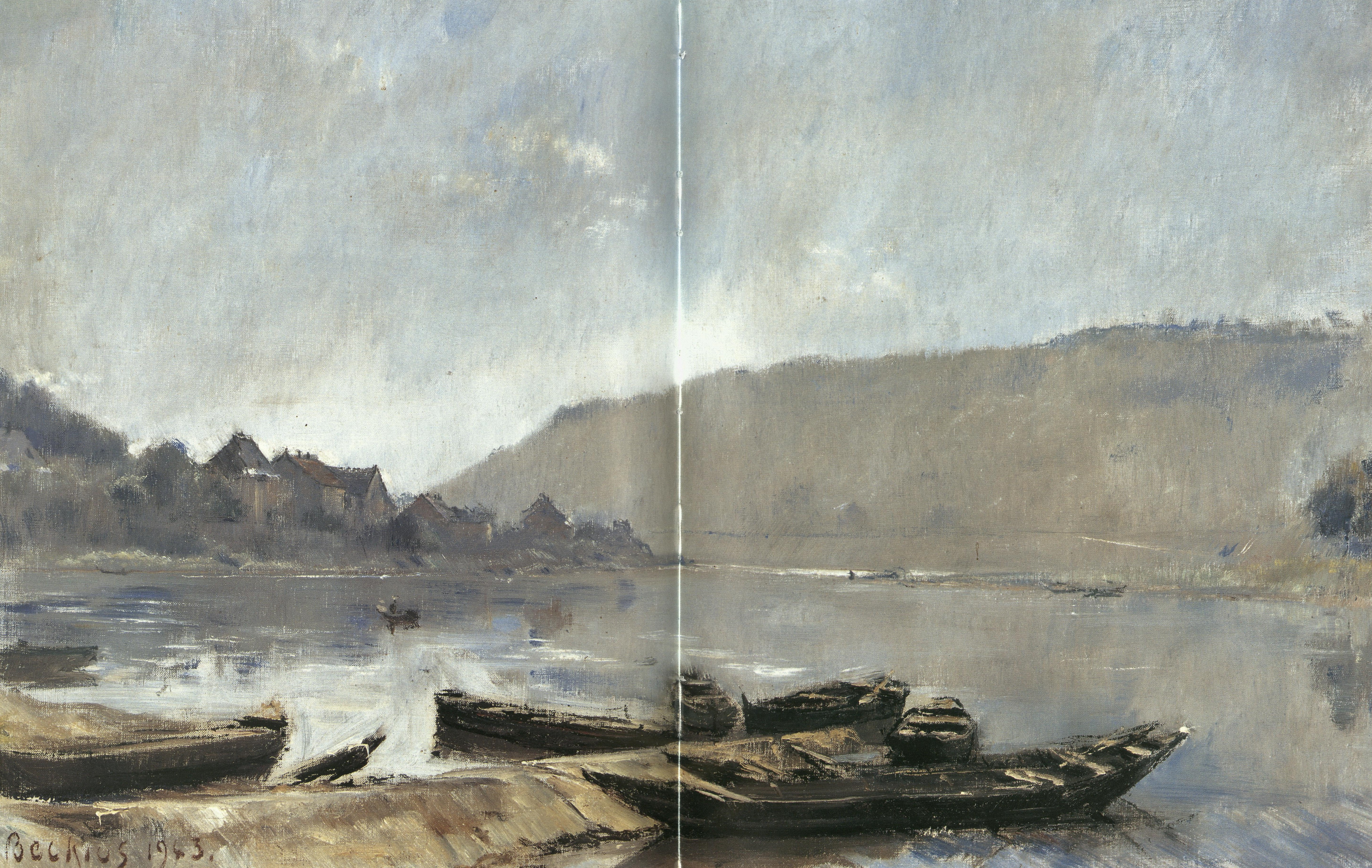 1943. Huile. 60 x 86 cm. Signé et daté en bas à gauche. Collection privée. (ouvrage numérisé).